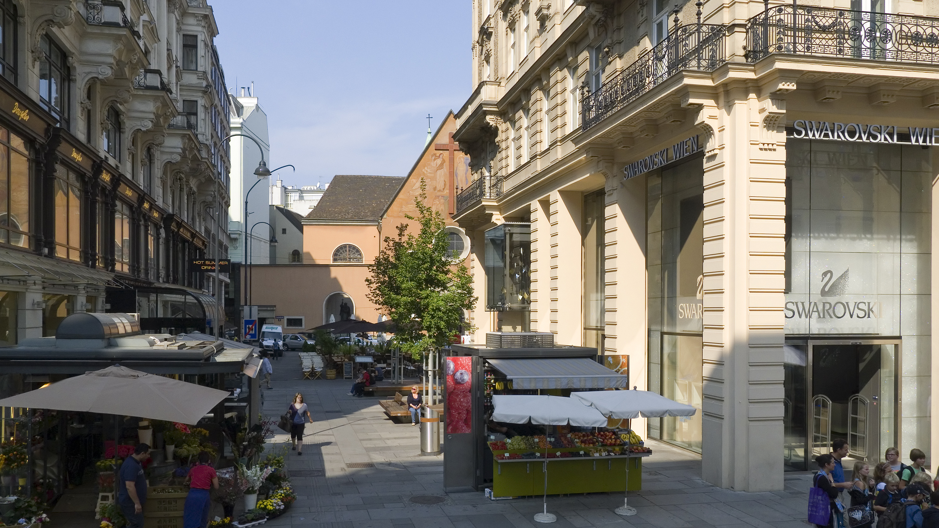 Marco-d’Aviano-Gasse in Wien 1 bei der Kärntner Straße Richtung Westen